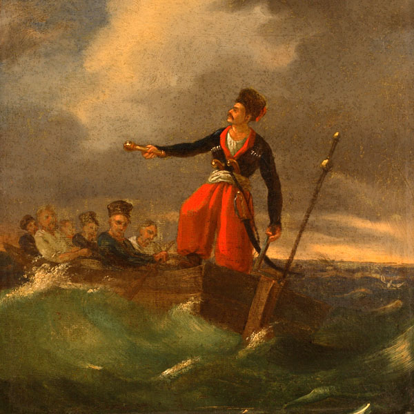 Гамалія. Полотно, олія (30 × 28). [1842]. ДМШ, інв. № ж — 97. За твердженням колишнього власника В. Б. Антоновича, цю картину, як свій твір, Шевченко нібито подарував художнику Ф. Ткаченку, який в свою чергу подарував її Антоновичу. З такими даними картина вперше була експонована у 1899 р. на виставці старовинних художніх речей та картин у Києві (див. «Археологическая летопись Южной России», 1899, стор. 34). З цього часу вона традиційно увійшла в літературу як твір Шевченка. Порушення історичної відповідності в костюмах персонажів картини, що не властиво творам Шевченка, а також техніка письма, чужа олійним творам Шевченка, вимагають додаткової перевірки щодо авторства.